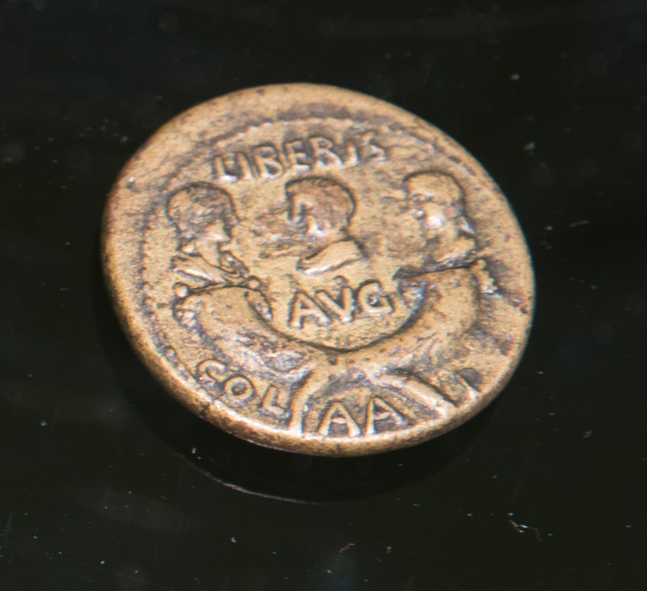 Monnaie émise par la colonie romaine de Patras (Péloponnèse). Alliage cuivreux, 14,98g, diam. 28,5 mm. Avers ; tête de Claude Revers : deux cornes d'abondance croisées, avec les bustes des enfants de Claude, Claudia Antonia, Claudia Octavia et Britannicus, legende LIBERIS AVG Conservé à la Biblioteca Apostolica Vaticana Claude, un empereur au destin singulier - Exposition au musée des Beaux-Arts de Lyon - 2018, catalogue p. 266